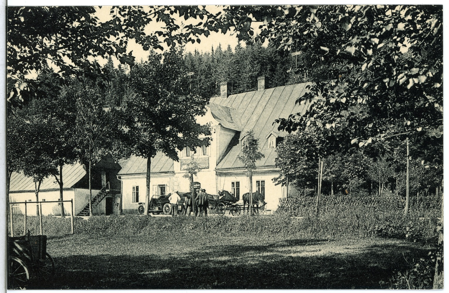 Breitenbach; Dreckschänke This postcard is from publisher Brück & Sohn in Meißen ( postcard has a unique number 14772 and is available in a higher resolution at the publisher. This images was uploaded in a cooperation project between Wikipedians and the publisher.